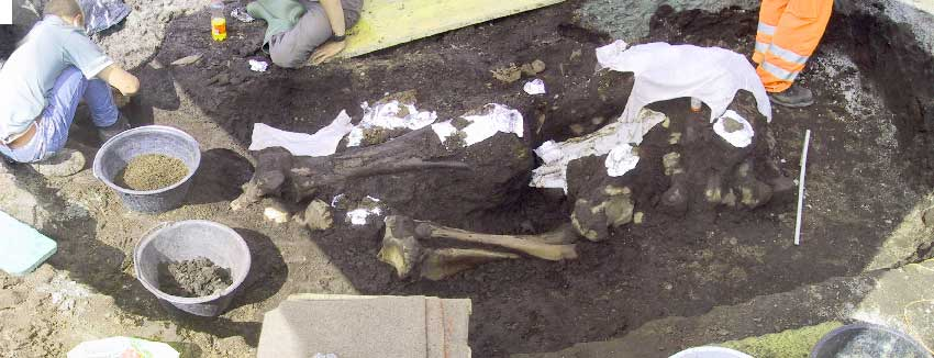 Mammutfund, Niederweningen, Schweiz